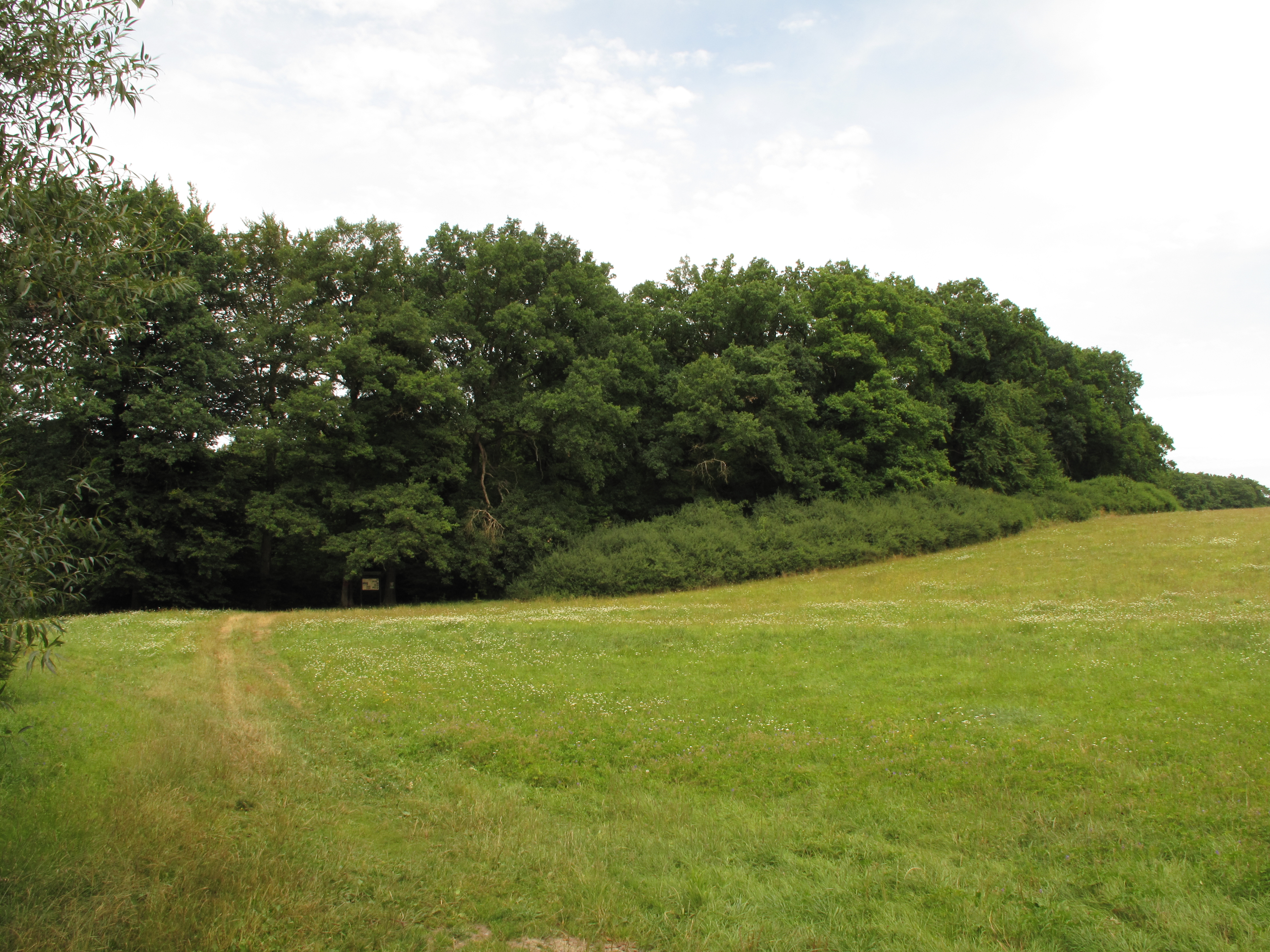 Přírodní rezervace Bažantnice. Okres Plzeň-sever, Česká republika.